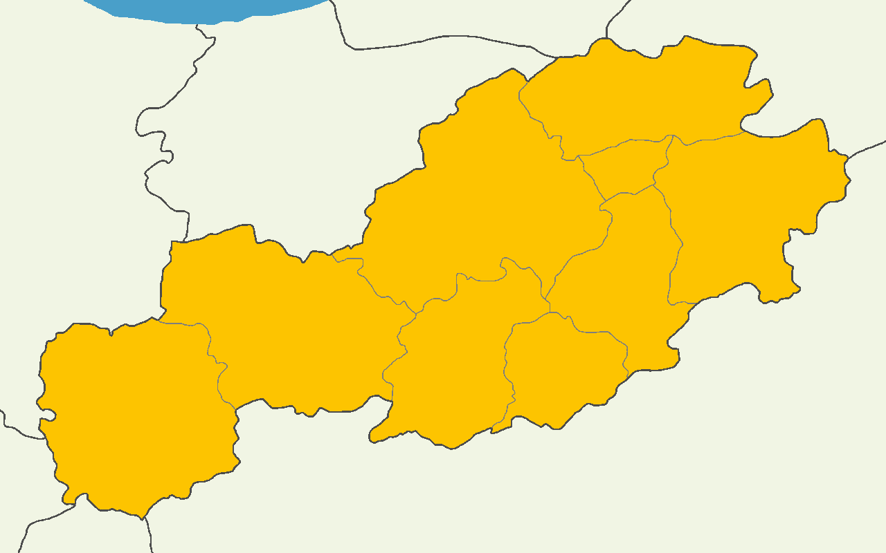 Bolu'da 2014 Türkiye cumhurbaşkanlığı seçimi sonuçları